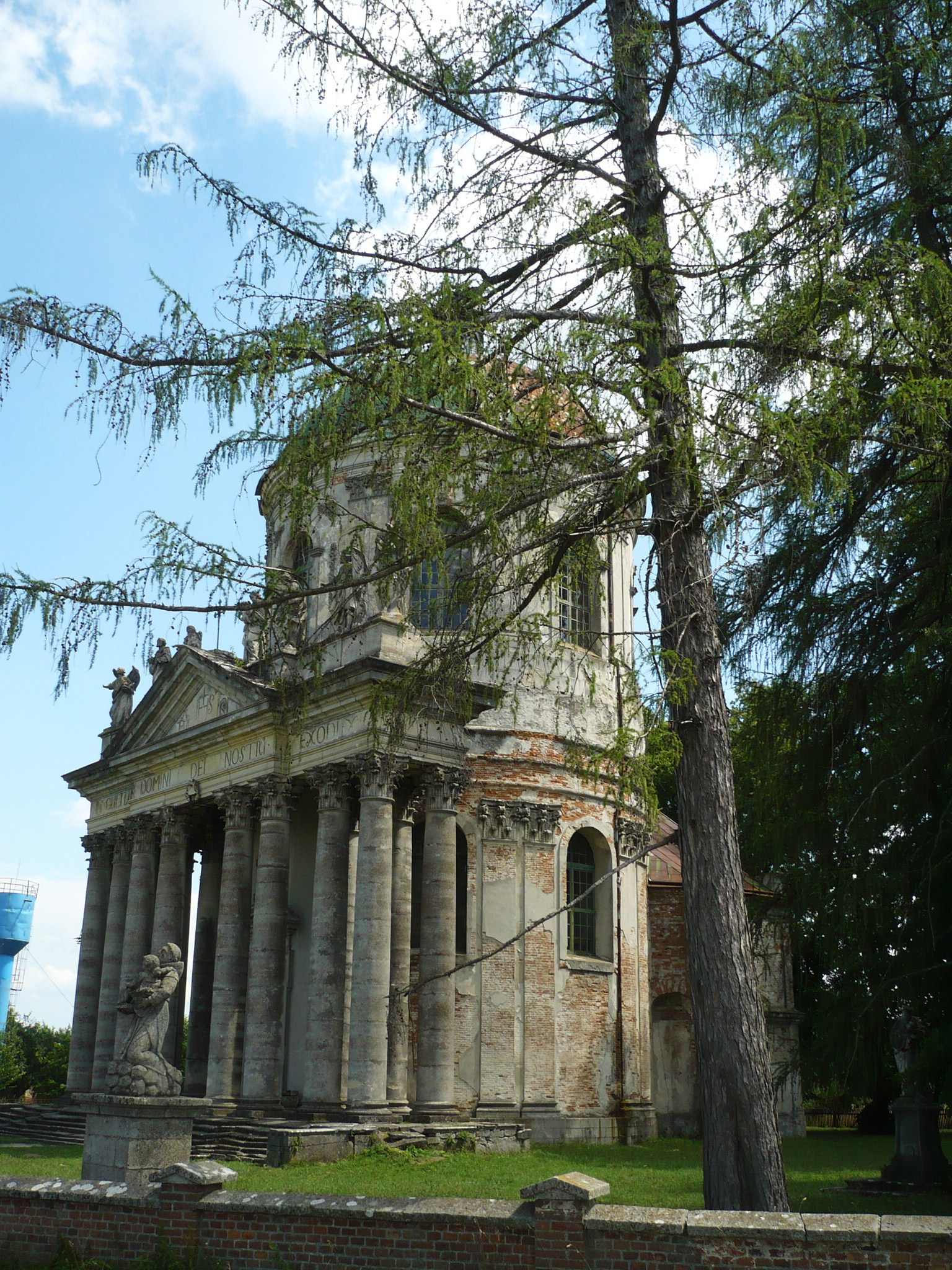 Kościół w Podhorcach